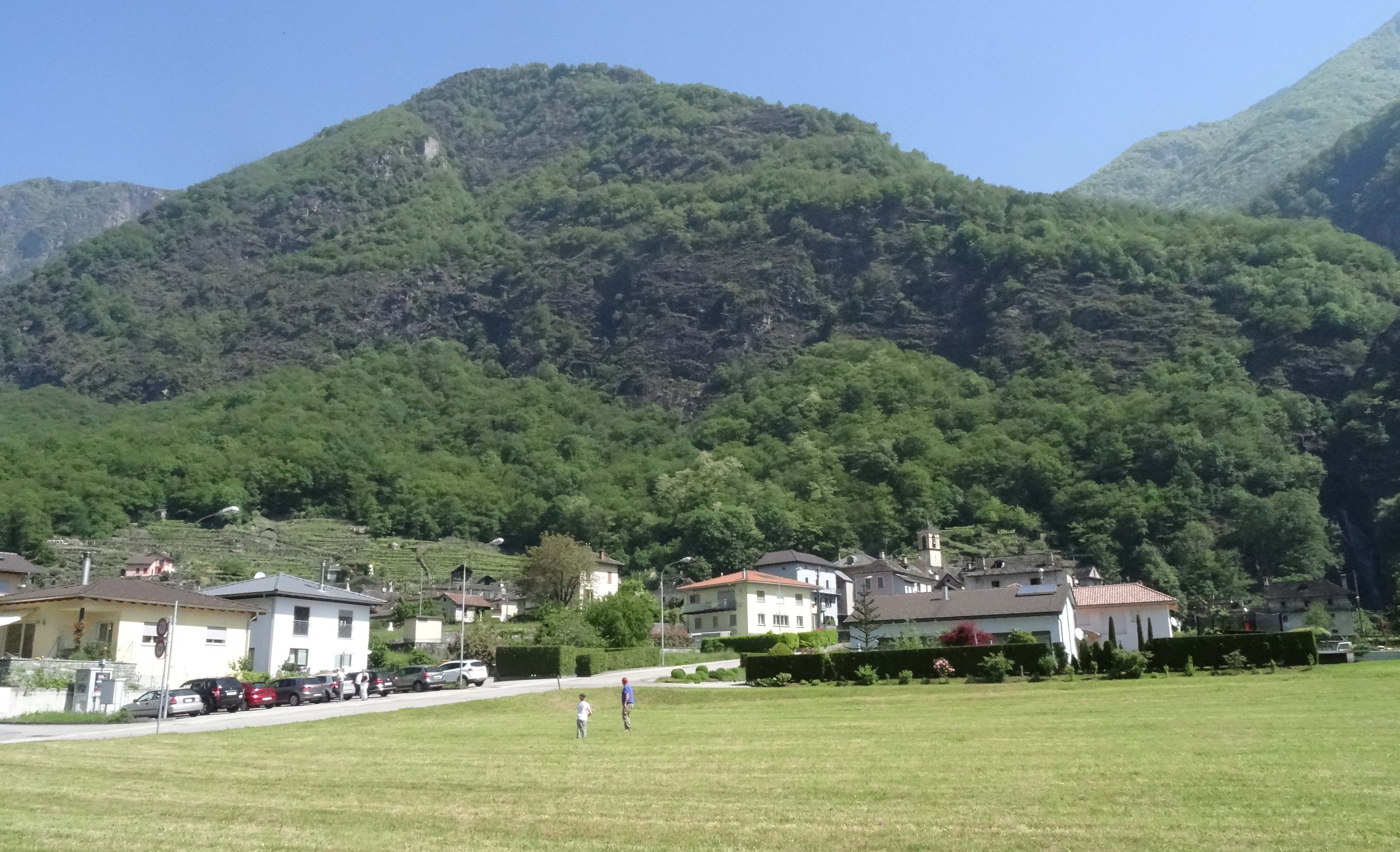 Giumaglio